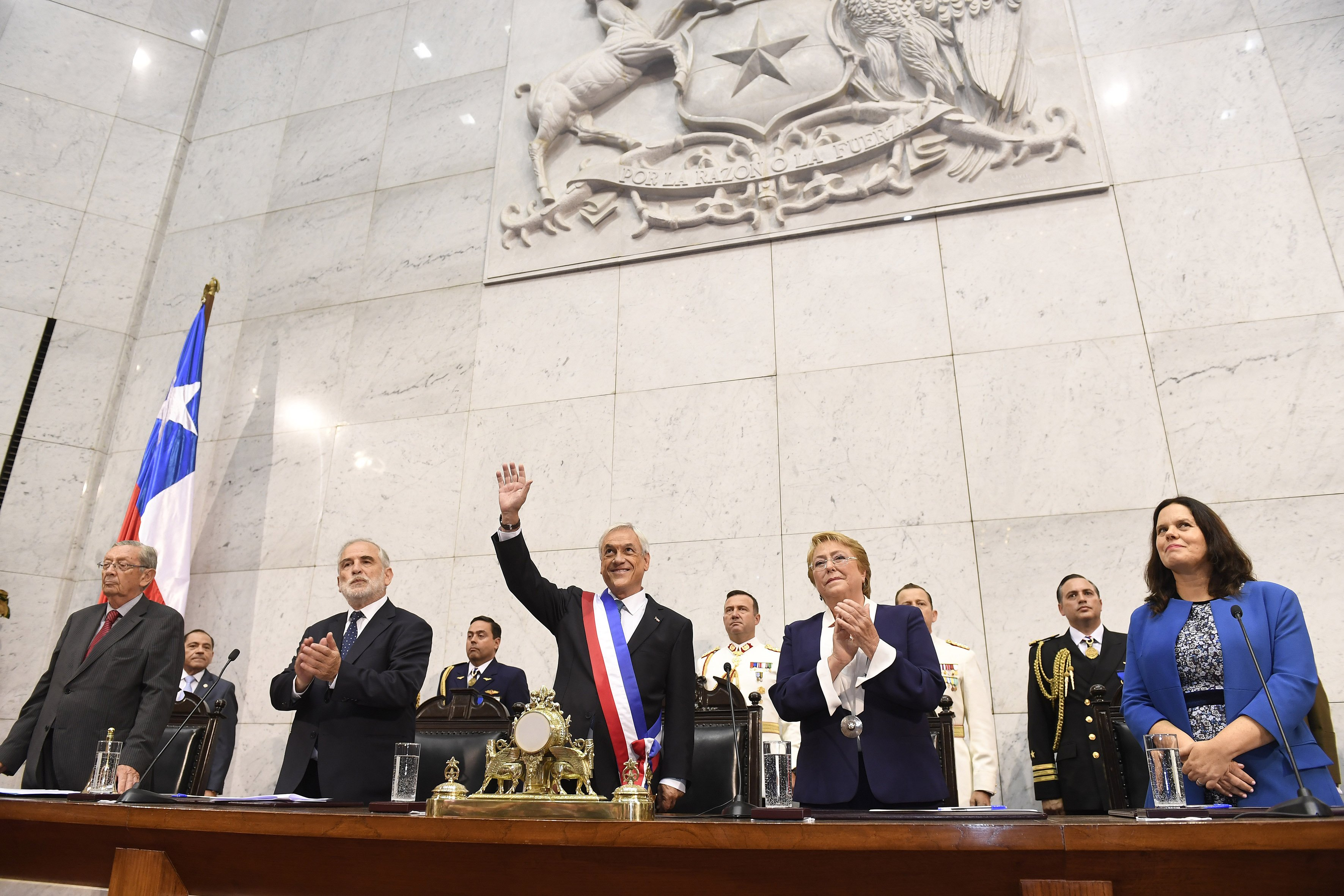 S.E. El Presidente la República de Chile Sebastián Piñera Echenique asume su segunda presidencia mientras que Michelle Bachelet concluye la suya.